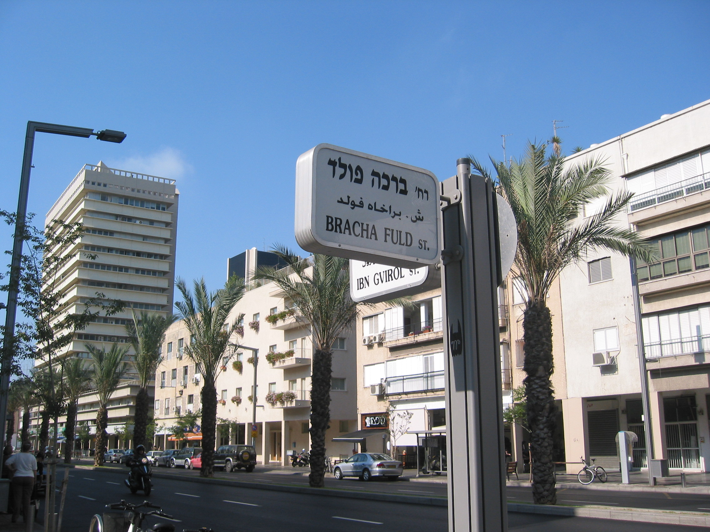 L